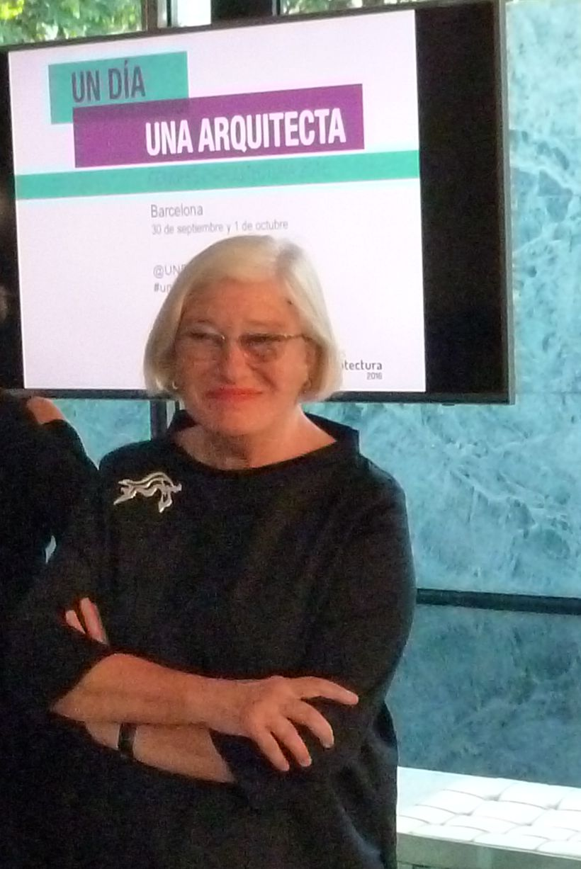 Susana Torre, arquitecta argentina